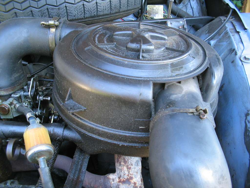 luchtfilter 2cv/acadiane